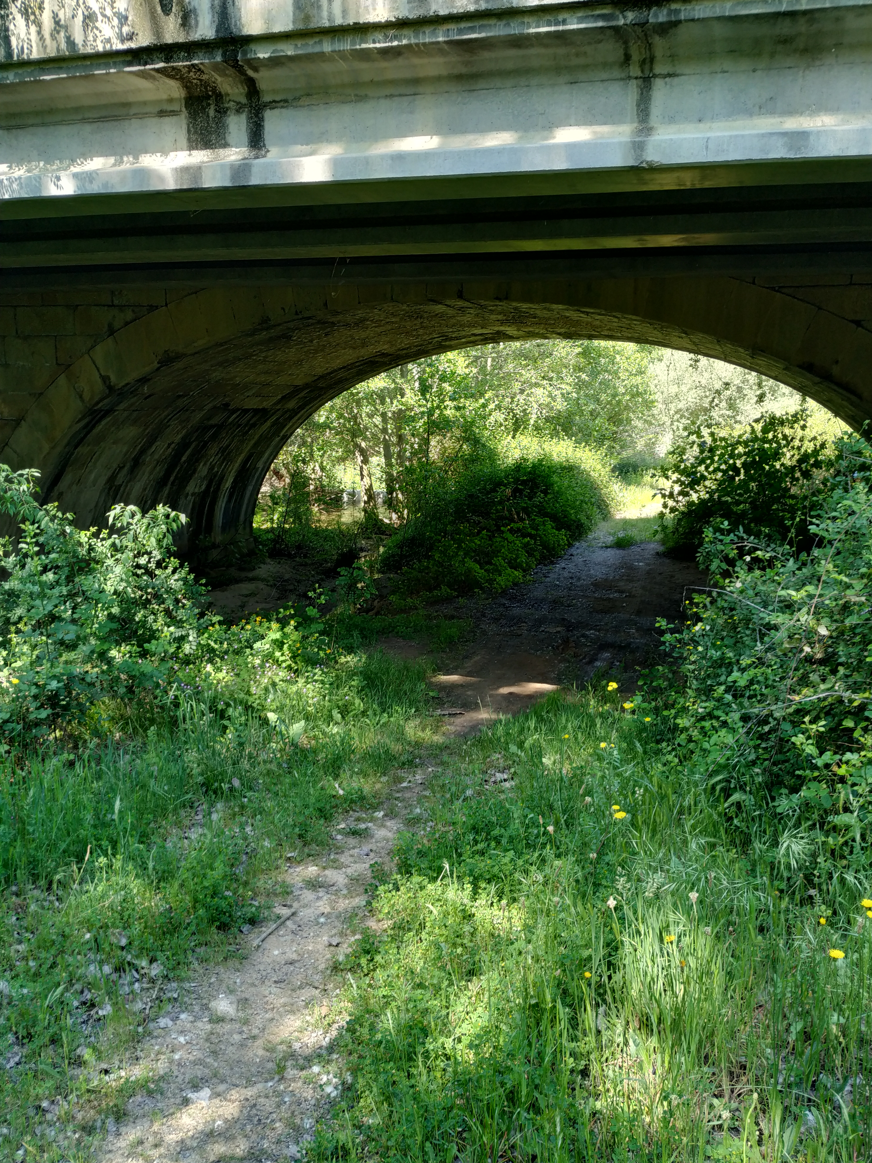 Puente romano bajo la N630 en el término municipal de La Granja